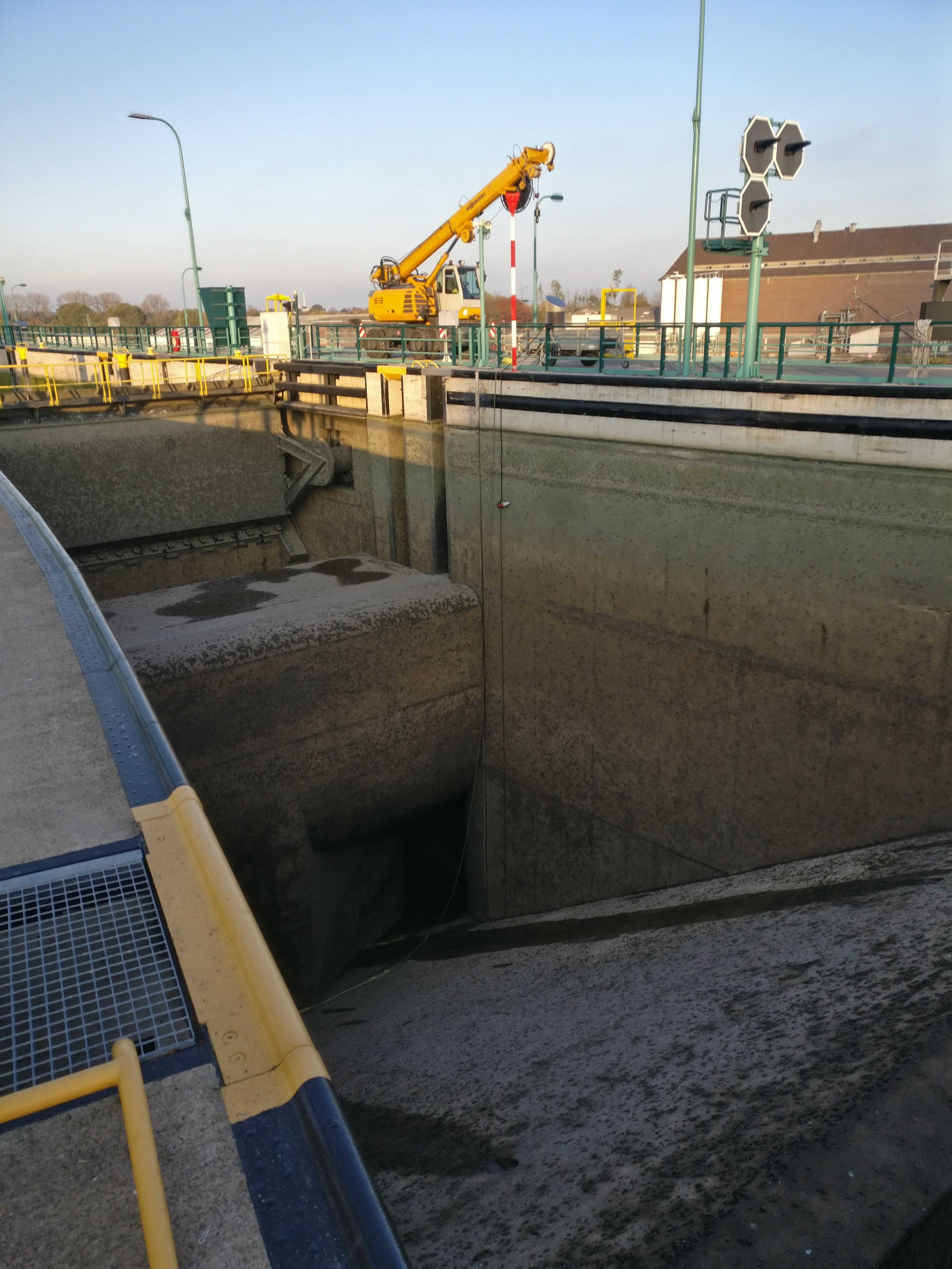 Blick auf das obere Tor der Weserschleuse Minden die für Wartungsarbeiten geleert wurde. Im unteren Teil des Bildes sind die Zuläufe für das Kanalwasser erkennbar, mit dem ein Teil des für die Schleusung benötigten Wassers aus dem Mittellandkanal entnommen wird.